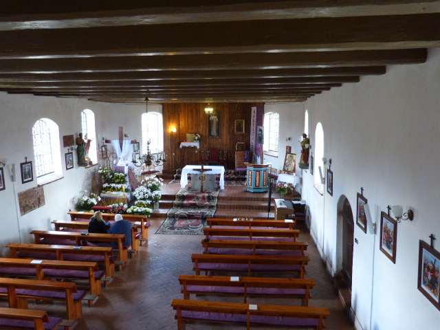 Kircheninnenraum